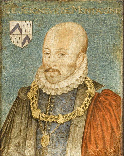 Michel Eyquem de Montaigne-Delecroix (1533–1592), French author